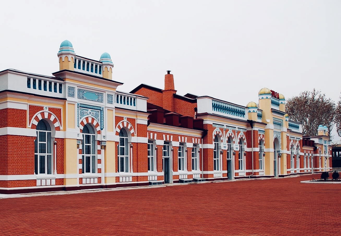 Culfa şəhəri